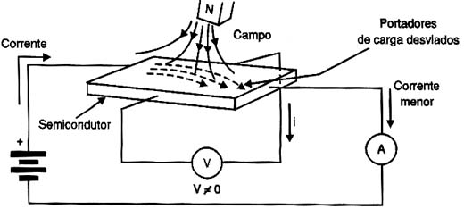 Descrição do efeito Hall em semicondutor.